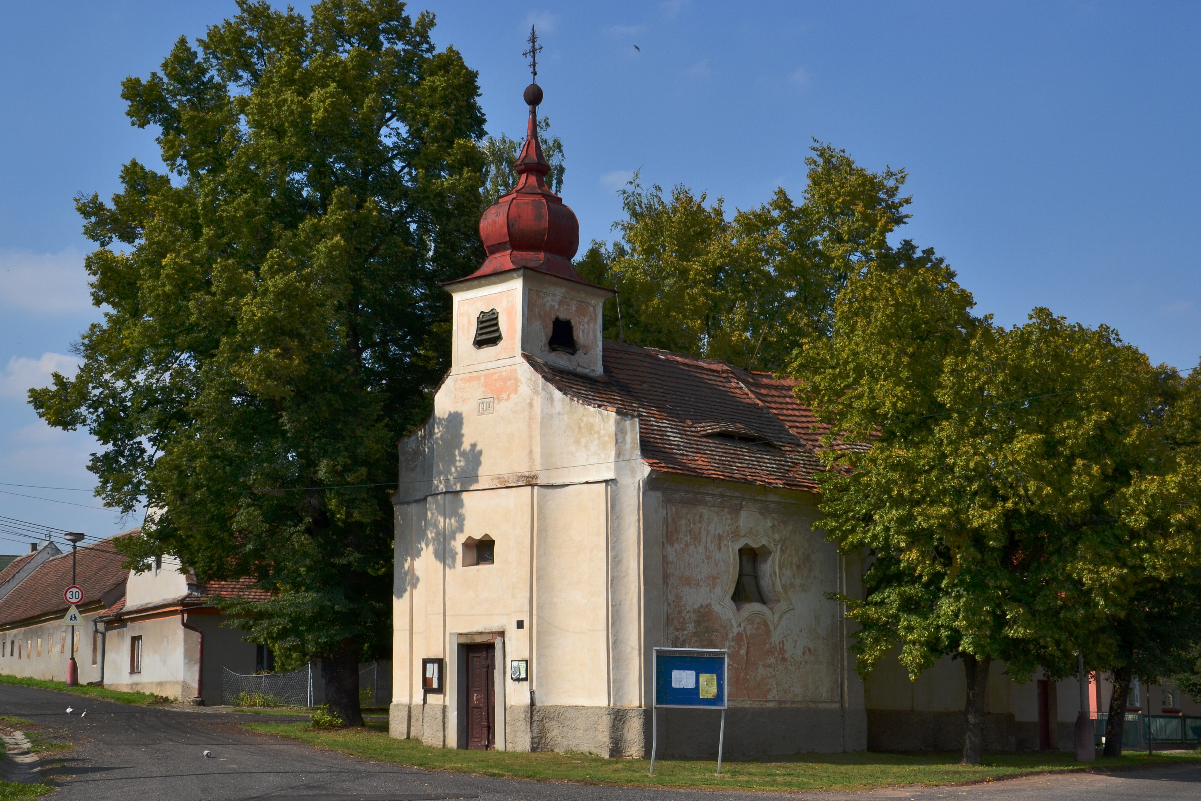 Kaple Nejsvětější Trojice (Liběšovice), náves, Liběšovice